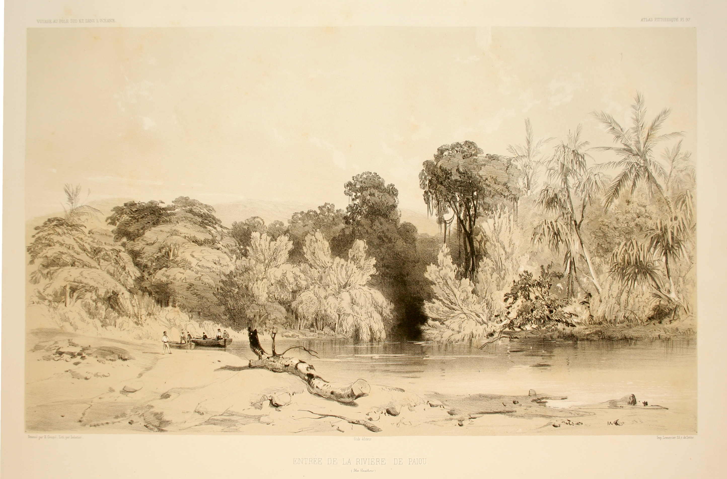 Entrée de la rivière de Païou (Île Vanikoro). Atlas pittoresque, planche 97